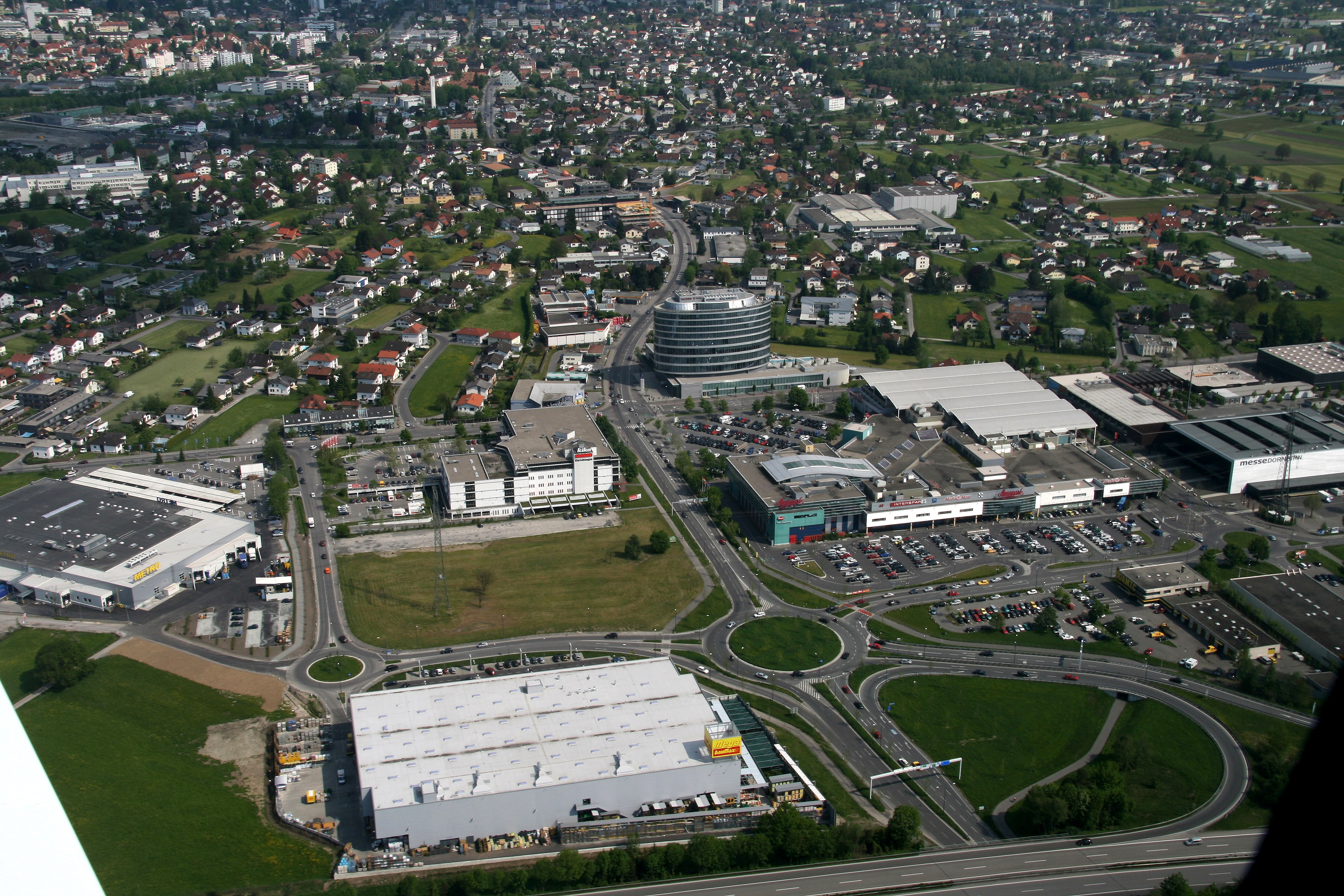 Rheintal/Walgau Autobahn, A14 . Verkehrsknoten Dornbirn Süd. Bild-Front: Mega bauMax, Mitte: Panoramahaus Mitte Links: Kika (Möbelhaus), Links: Metro, Rechts:Messepark und ein Teile des Dornbirner Messegeländes, Front-Rechts ÖAMTC. Aufgenommen während eines Fluges mit einer Propellermaschine des Types: D-EJCR Robin DR400-180R. Zur Beachtung die verschiedenen Kreisverkehrsarten.